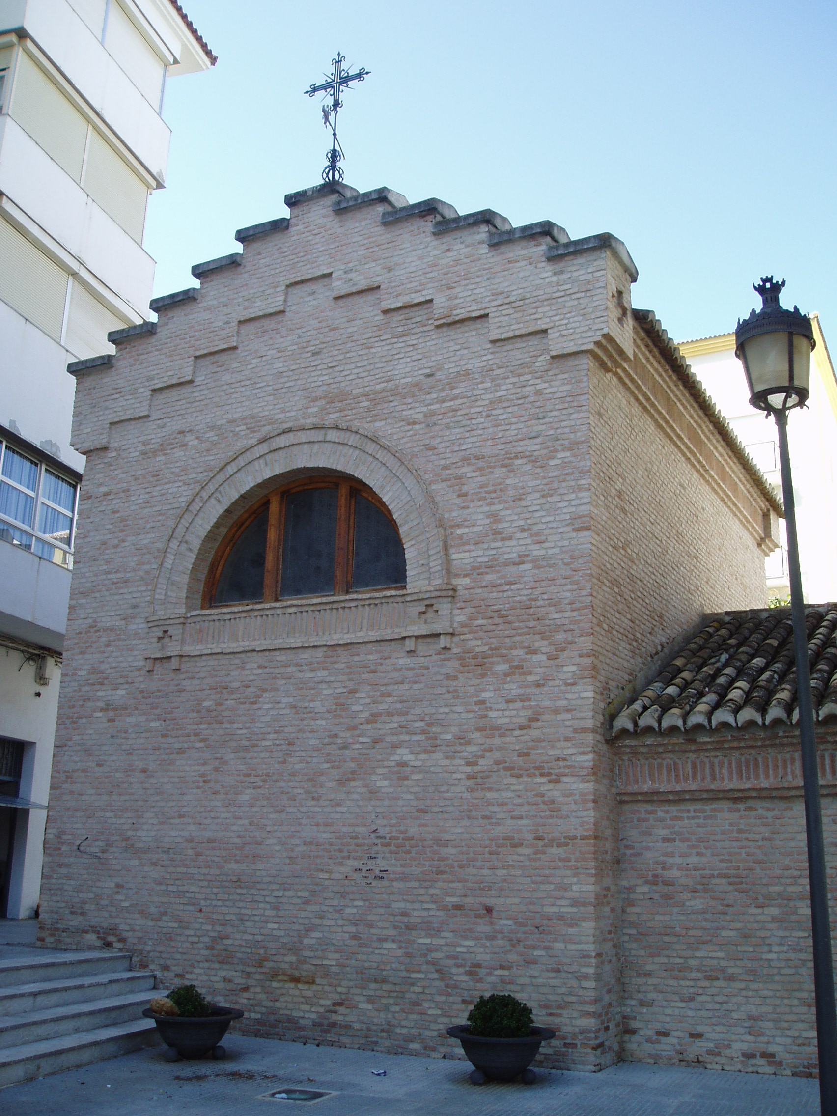 Mausoleo de Narváez en Loja, Granada.